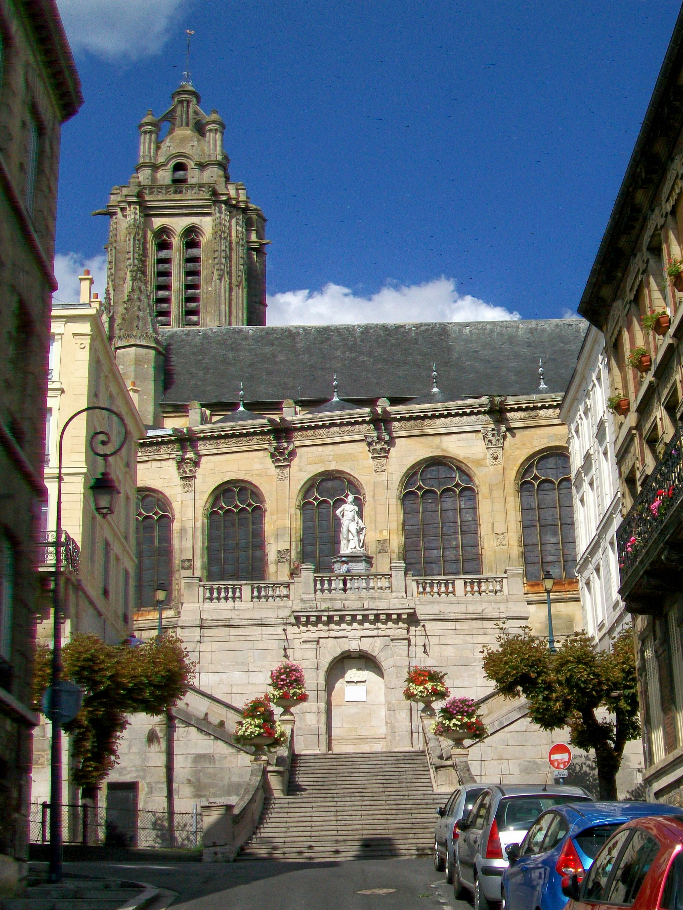 La cathédrale Saint-Maclou, depuis la rue Thiers au sud.